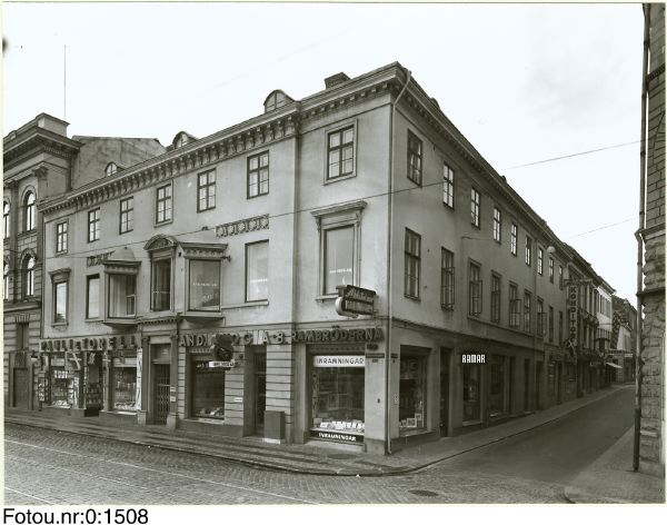 Södra Hamngatan 25 - Korsgatan 2-6 i Göteborg, kallat "Åkermanska huset". Foto från år 1959. Fotograf Stig Sjöstedt. Göteborgs stadsmuseums bildsamling.